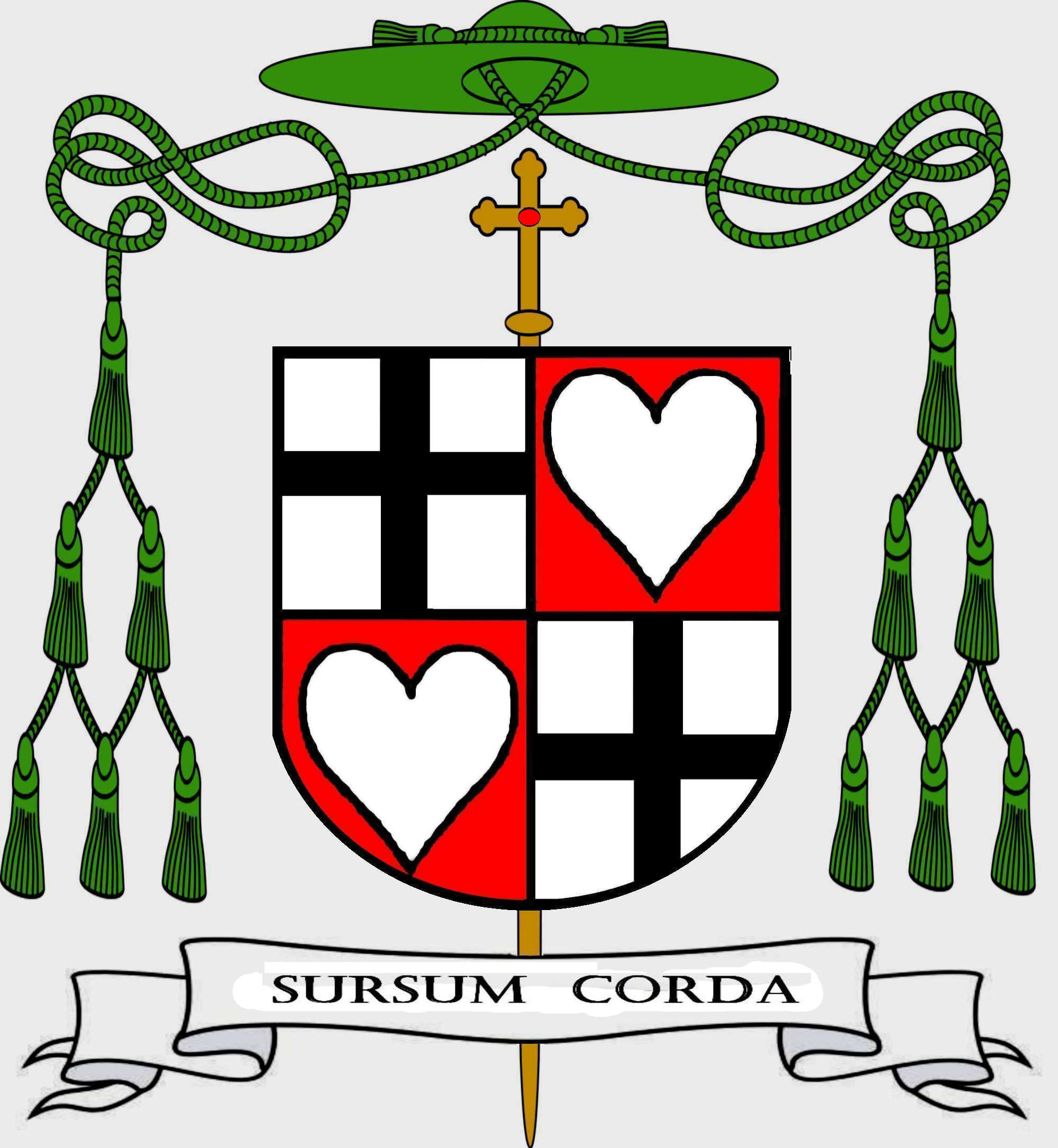 Wappen Adolf Bolte (1901-1974), Bischof in Fulda 1959-19574